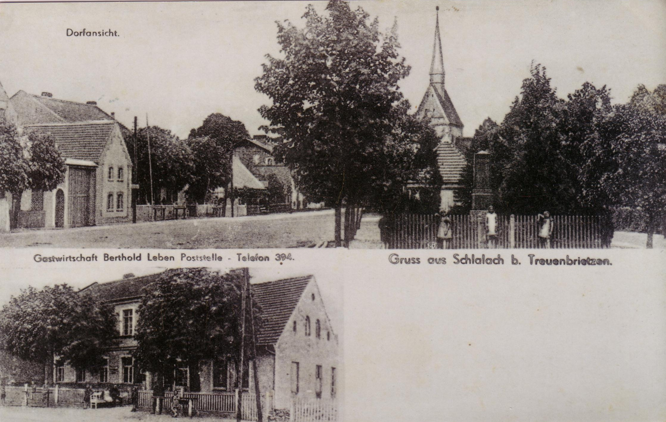 Dorfplatz um 1925